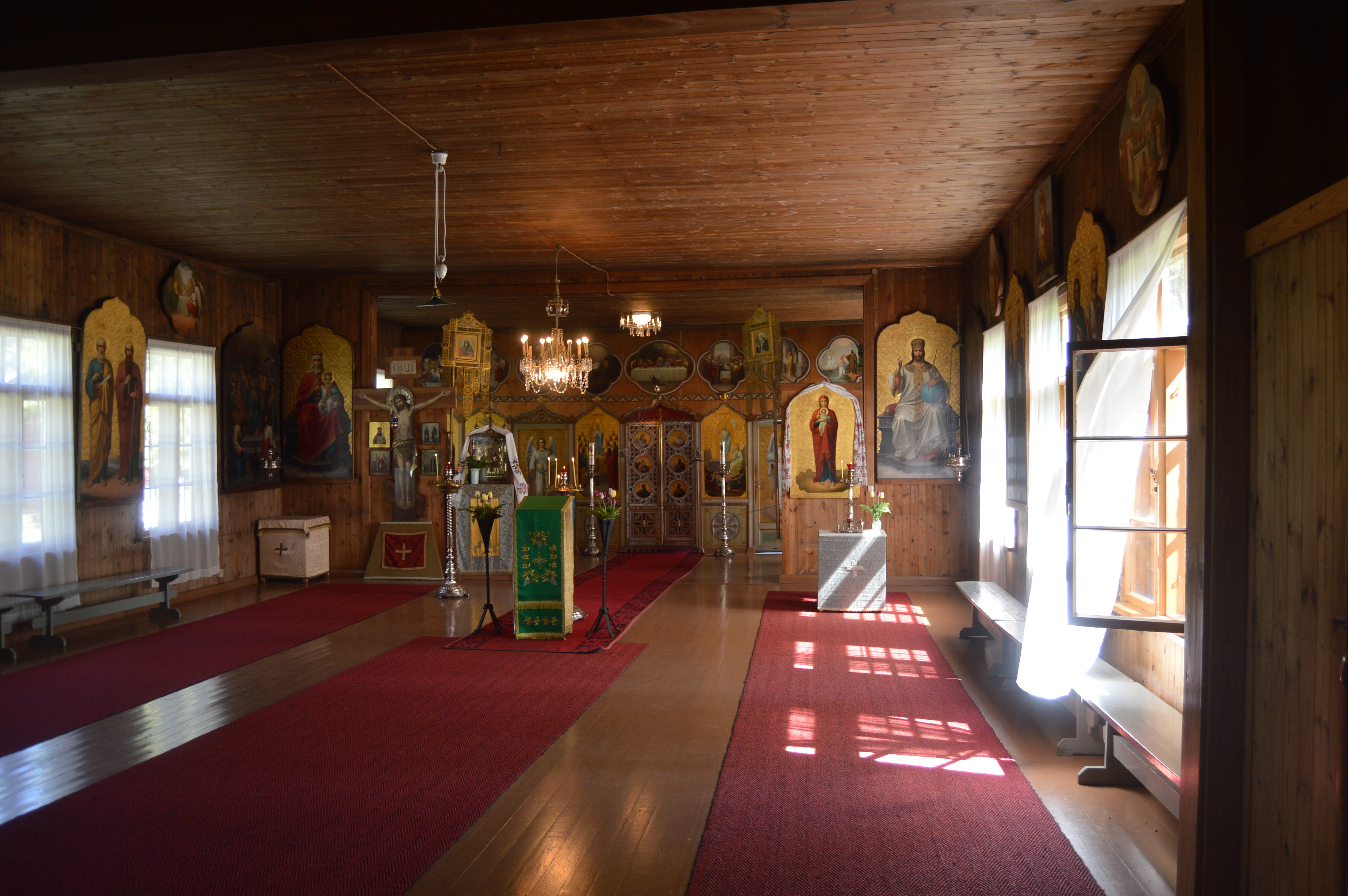 Heinäveden Valamon luostarin vanha kirkko (Kaikkien Valamon pyhien kirkko)